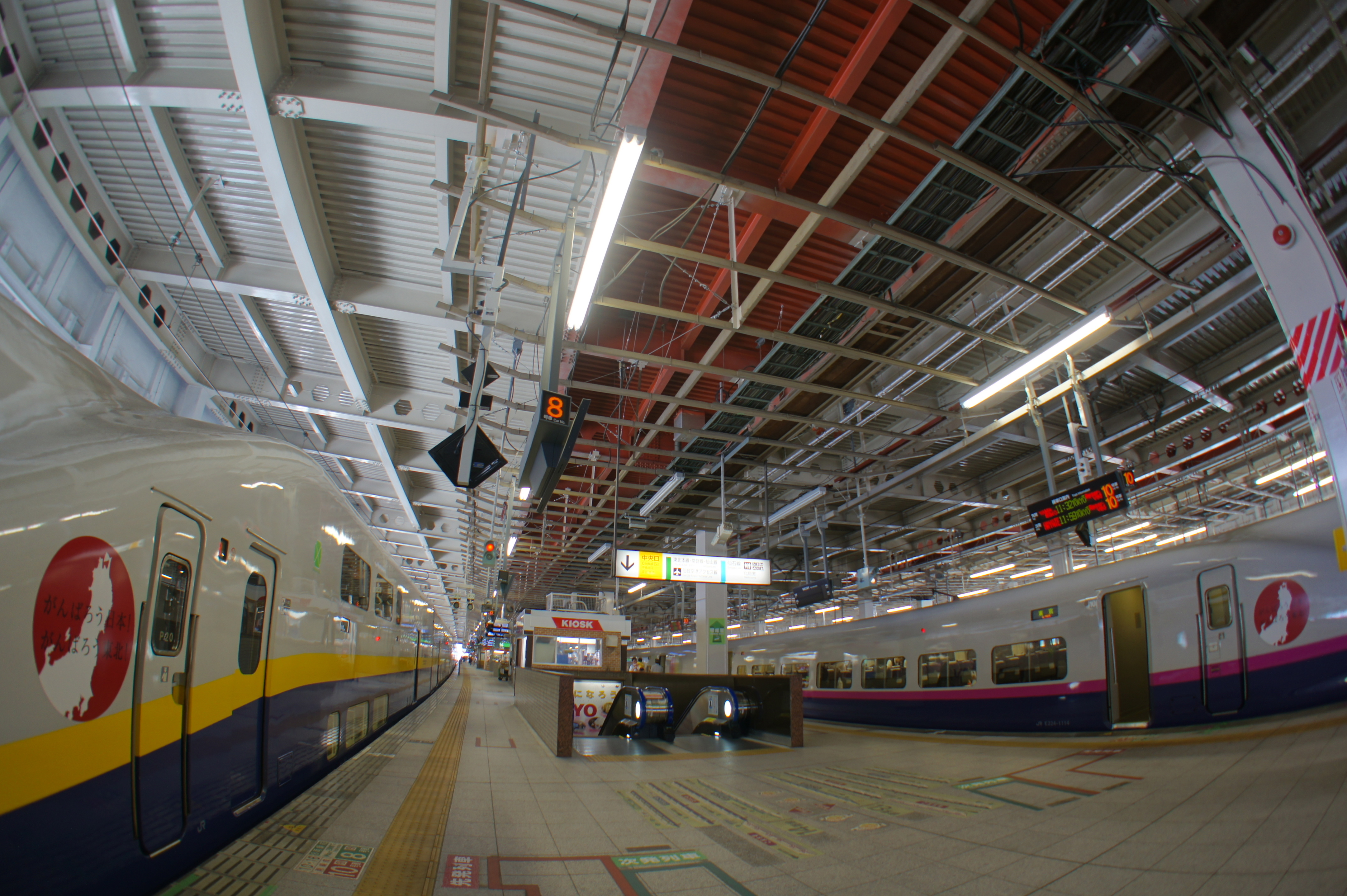 天井化粧パネルの多くが落下したため、 すべて撤去の上、営業される仙台駅新幹線ホーム （2011年6月6日撮影）